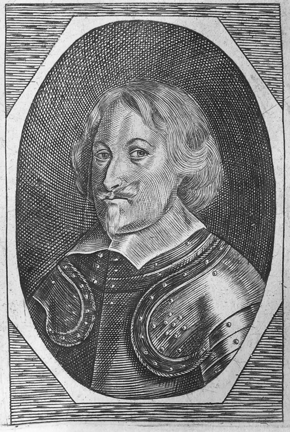 Portrait des Feldmarschalls der Katholischen Liga im Dreißigjährigen Krieg und Kaiserlichen Kriegsrats Reichsgraf Alexander II. von Velen (1599-1675) im Harnisch